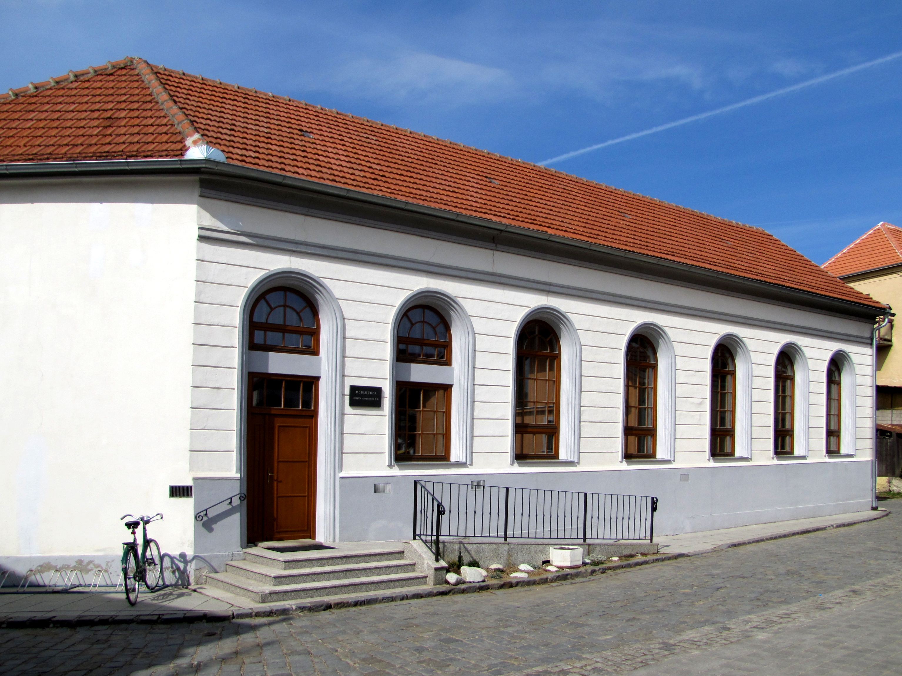 Bývalá synagoga ve Veselí nad Moravou z roku 1840, dnes modlitebna Církve adventistů sedmého dne.